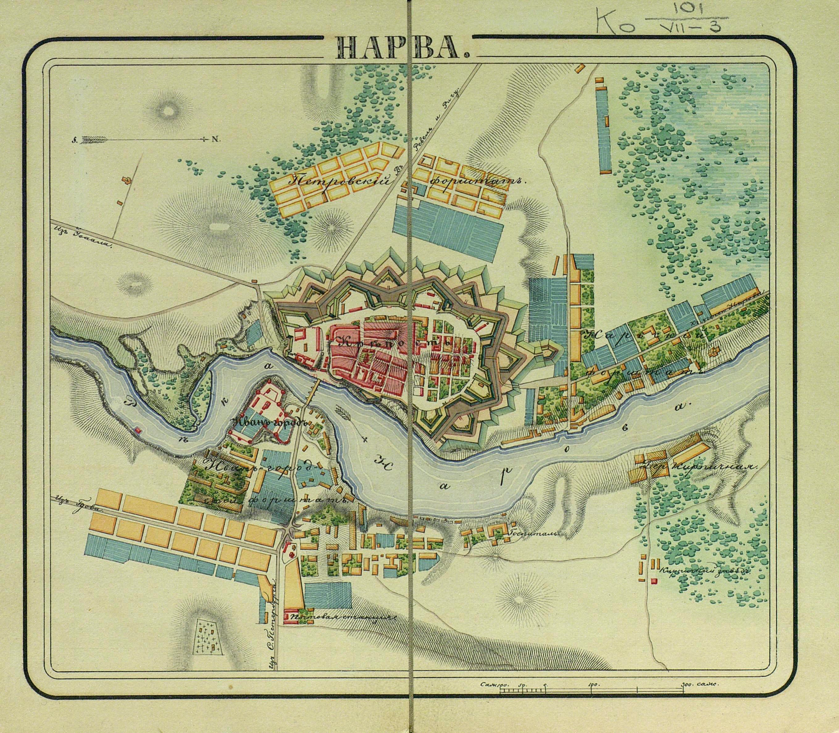 из "Атласа крепостей Российской империи"